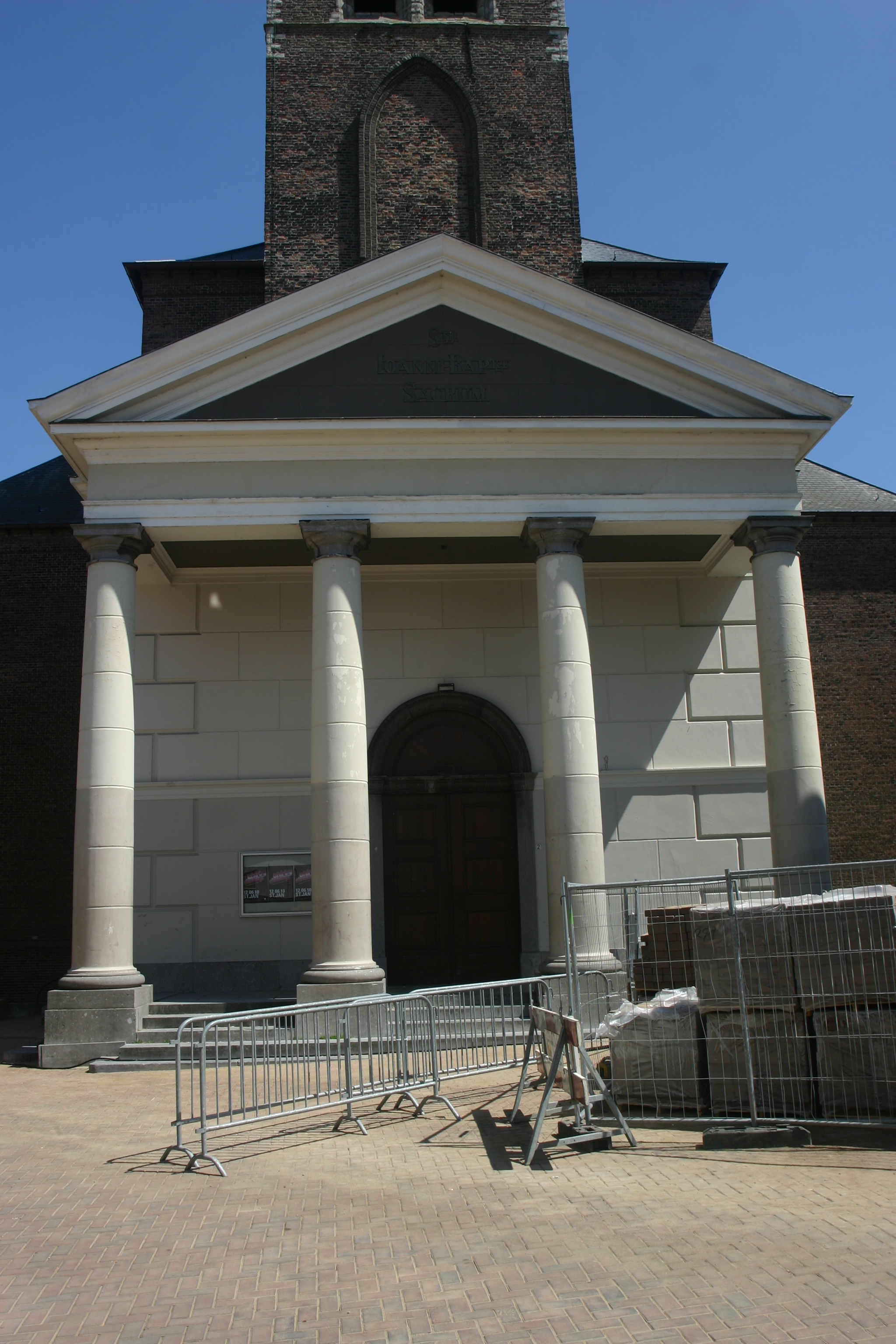 R.K. kerk van Sint Jan de Doper, Markt 2